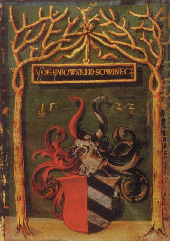 Znak Voka Pňovského ze Sovince